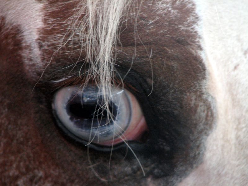 Blue Appaloosa eye